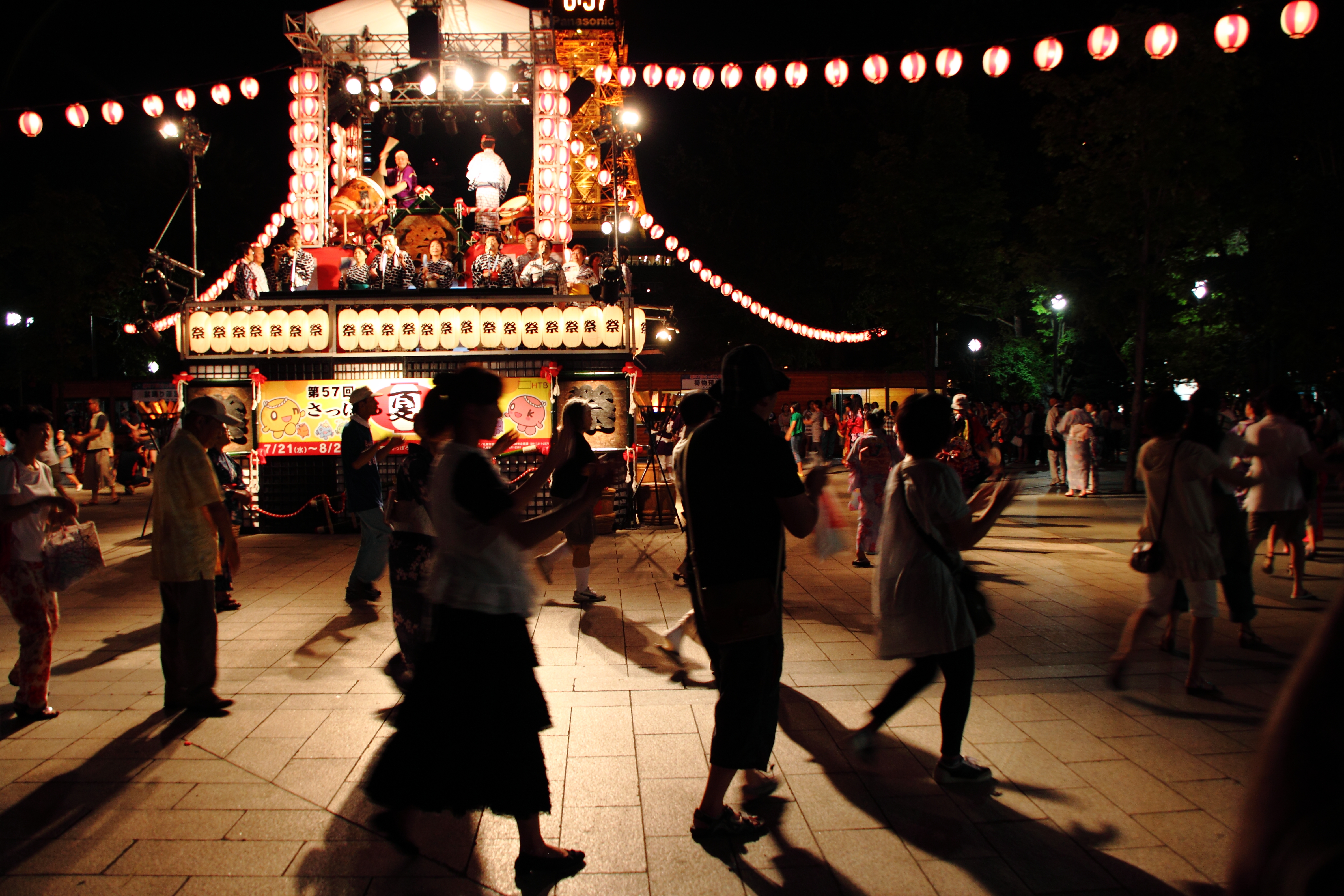 盆踊りは酒を飲みながら単調なリズムで輪になって踊り続けることでトランス状態になれる、昔の人の知恵だそうです。